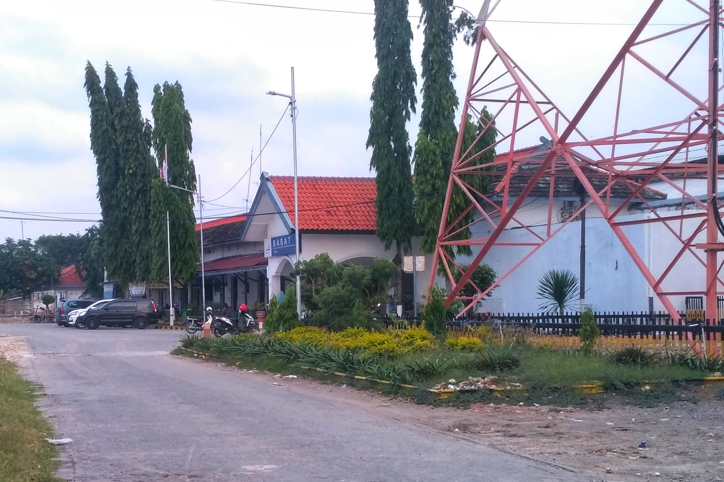 Stasiun Babat yang dipotret dari arah barat; dengan beberapa mobil dan motor yang diparkir di latar depannya.